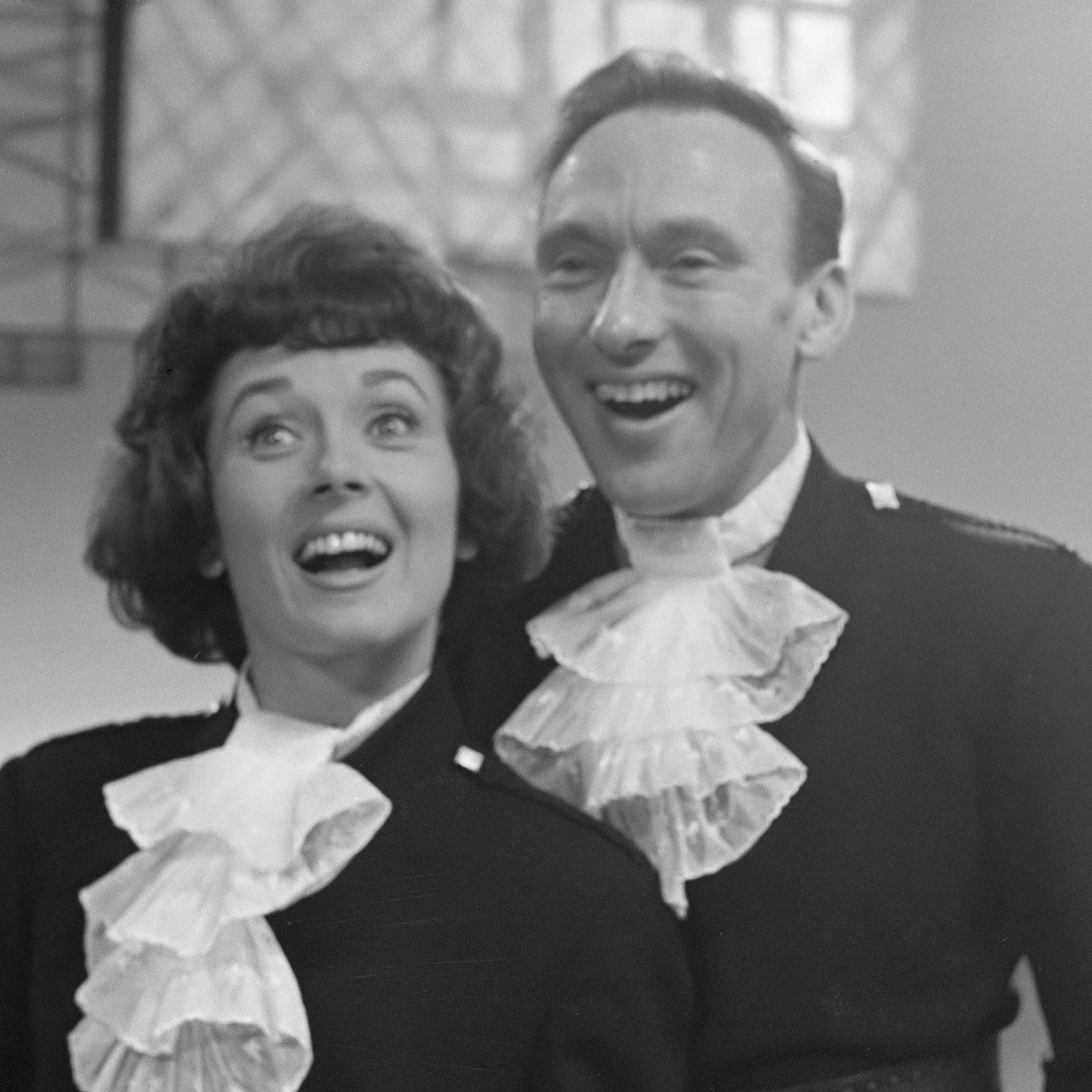 TV Music Hall in Treslong, Pearl Carr en Teddy Johnson 12 december 1962